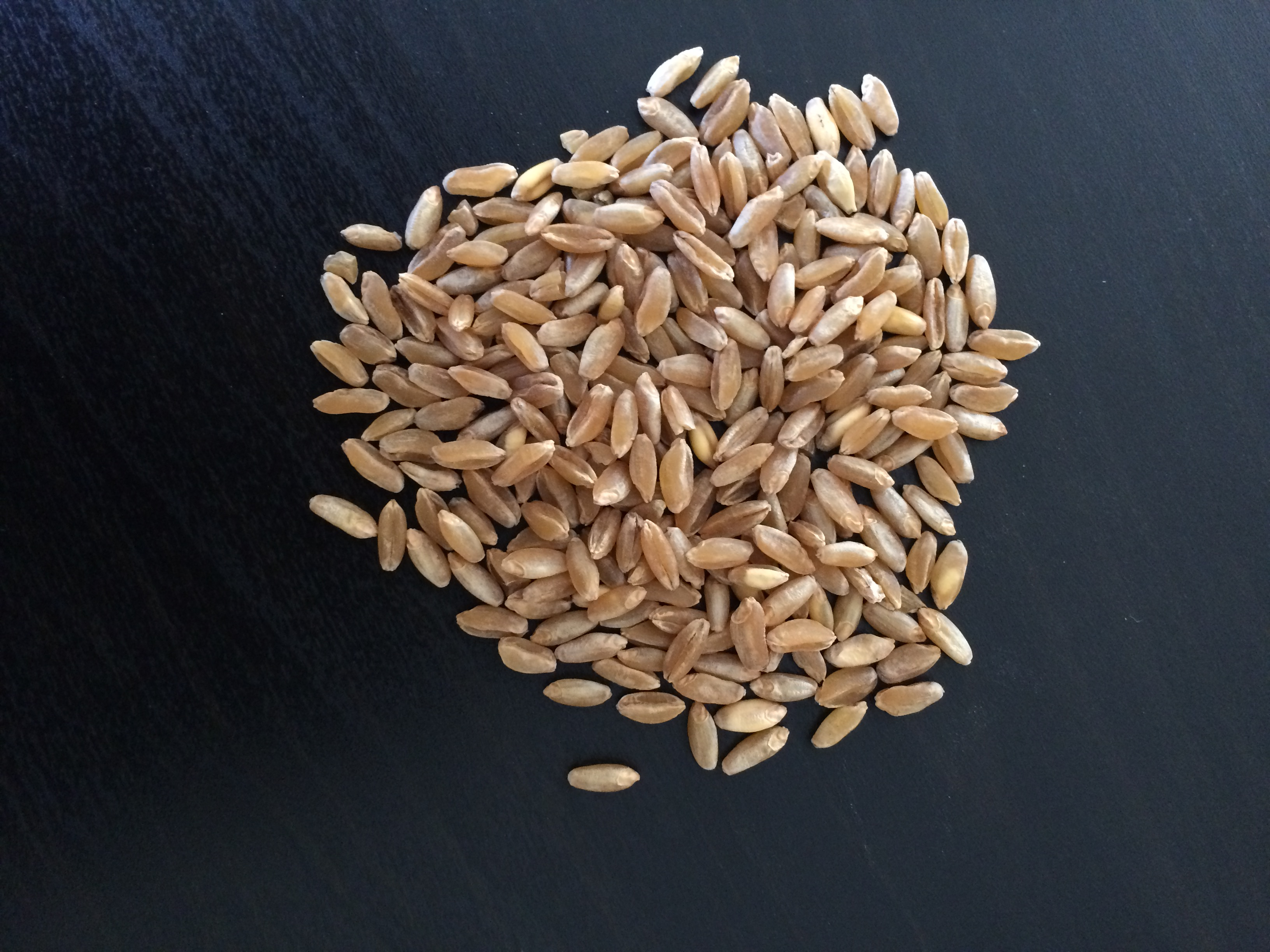 Chicchi di grano Russello